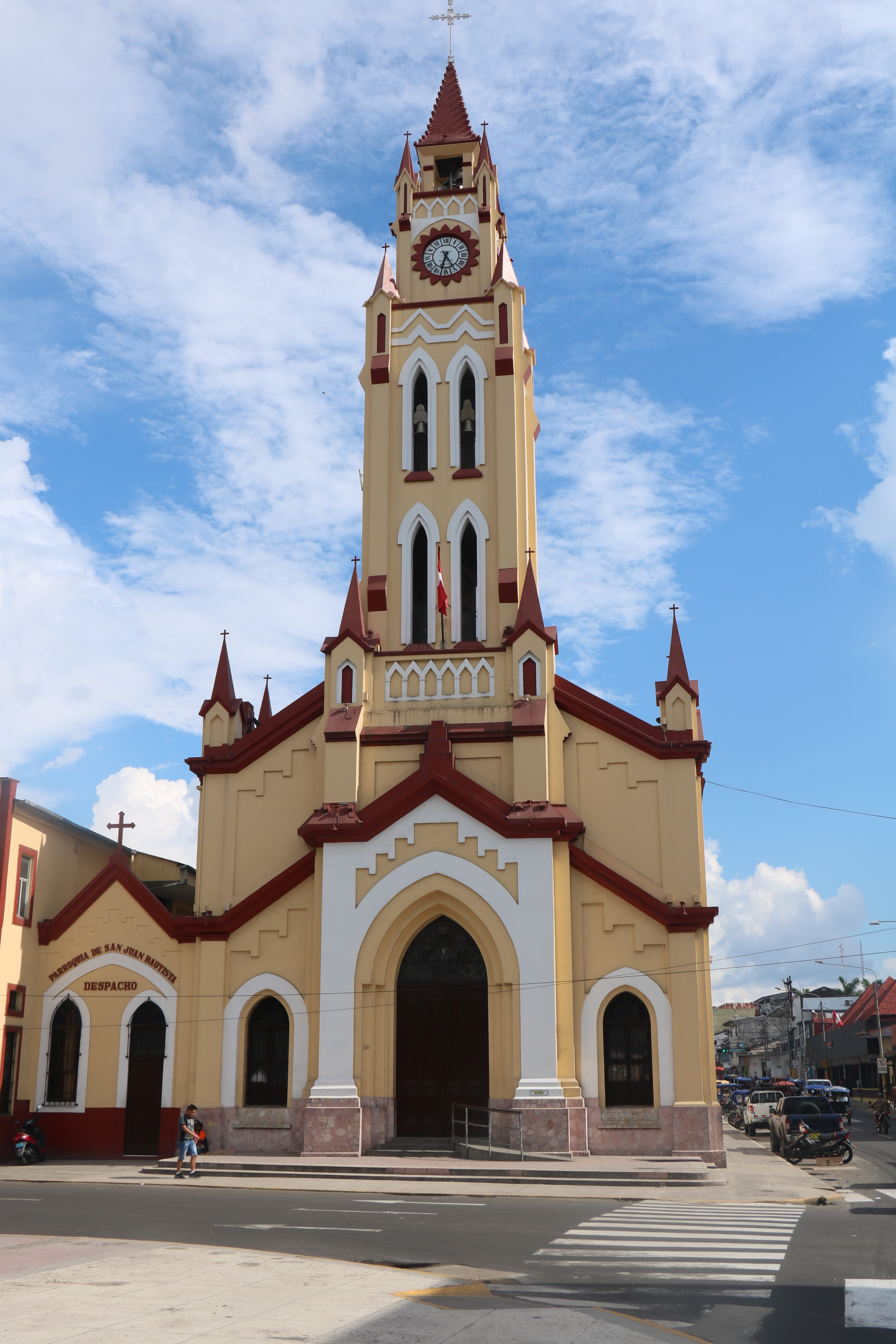 La Catedral de Iquitos en Loreto, Perú.